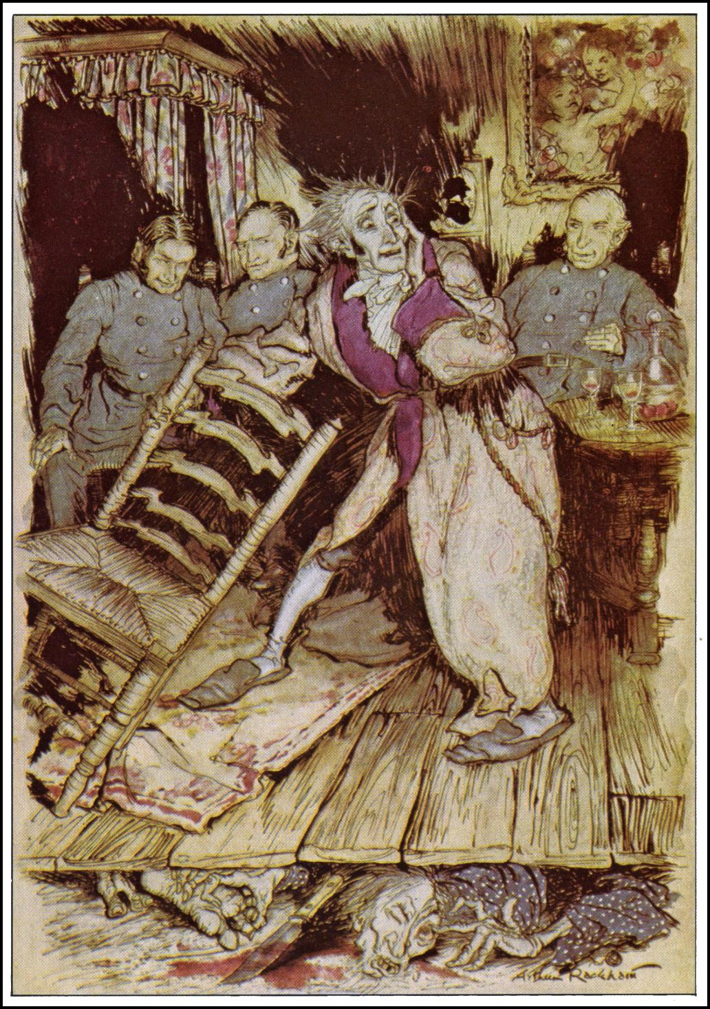 Иллюстрация Артура Рэкхема из книги "Poe's Tales of Mystery and Imagination" к рассказу Эдгара По "Сердце-обличитель"